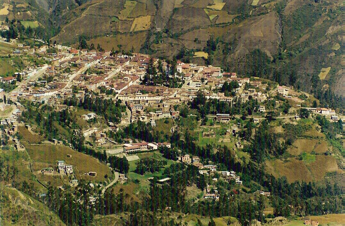 Vue du village de Sorata (Bolivie) depuis les hauteurs de Purani Churiquimbaya